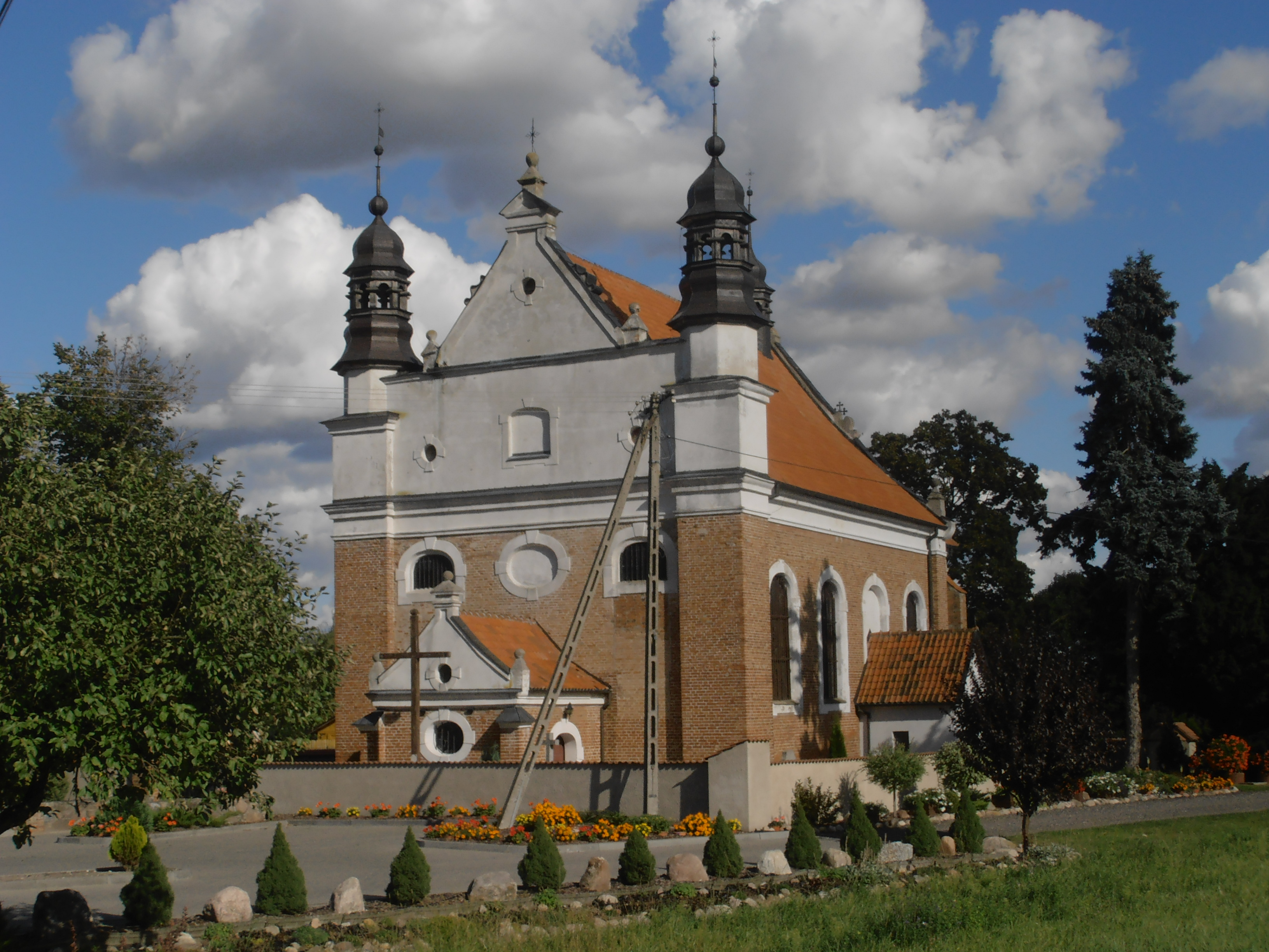 Topolno - kościół klasztorny paulinów, obecnie rzymskokatolicki parafialny p.w. Nawiedzenia NMP, 1681 (Sanktuarium Matki Bożej Uzdrowienia Chorych).